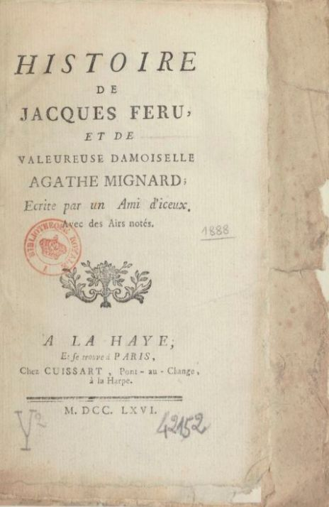 Histoire de Jacques Feru (1766).